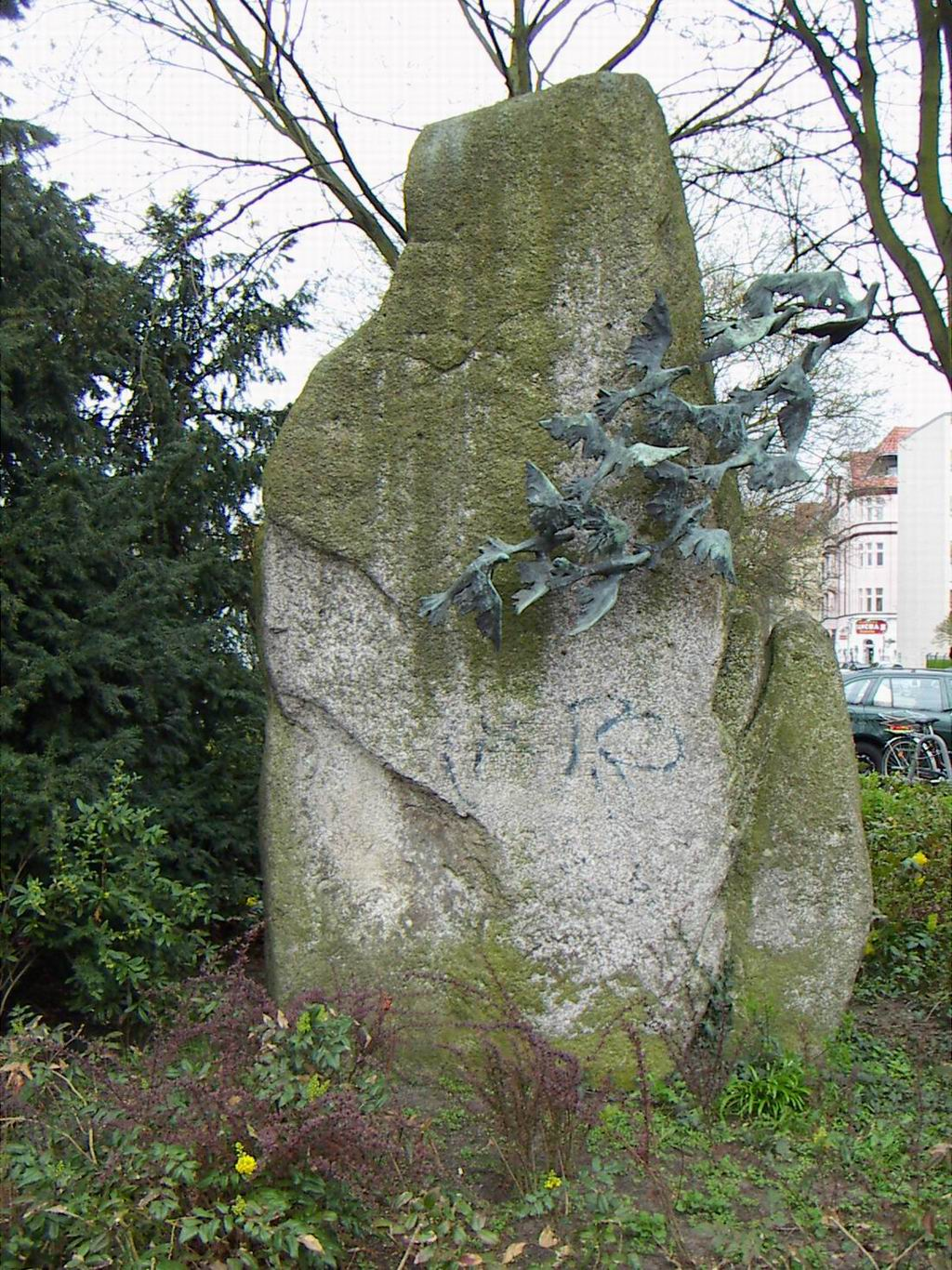 Berlin-Spandau, Denkmal für die Brieftauben Fotografiert von Dieter Brügmann am 13. April 2005.